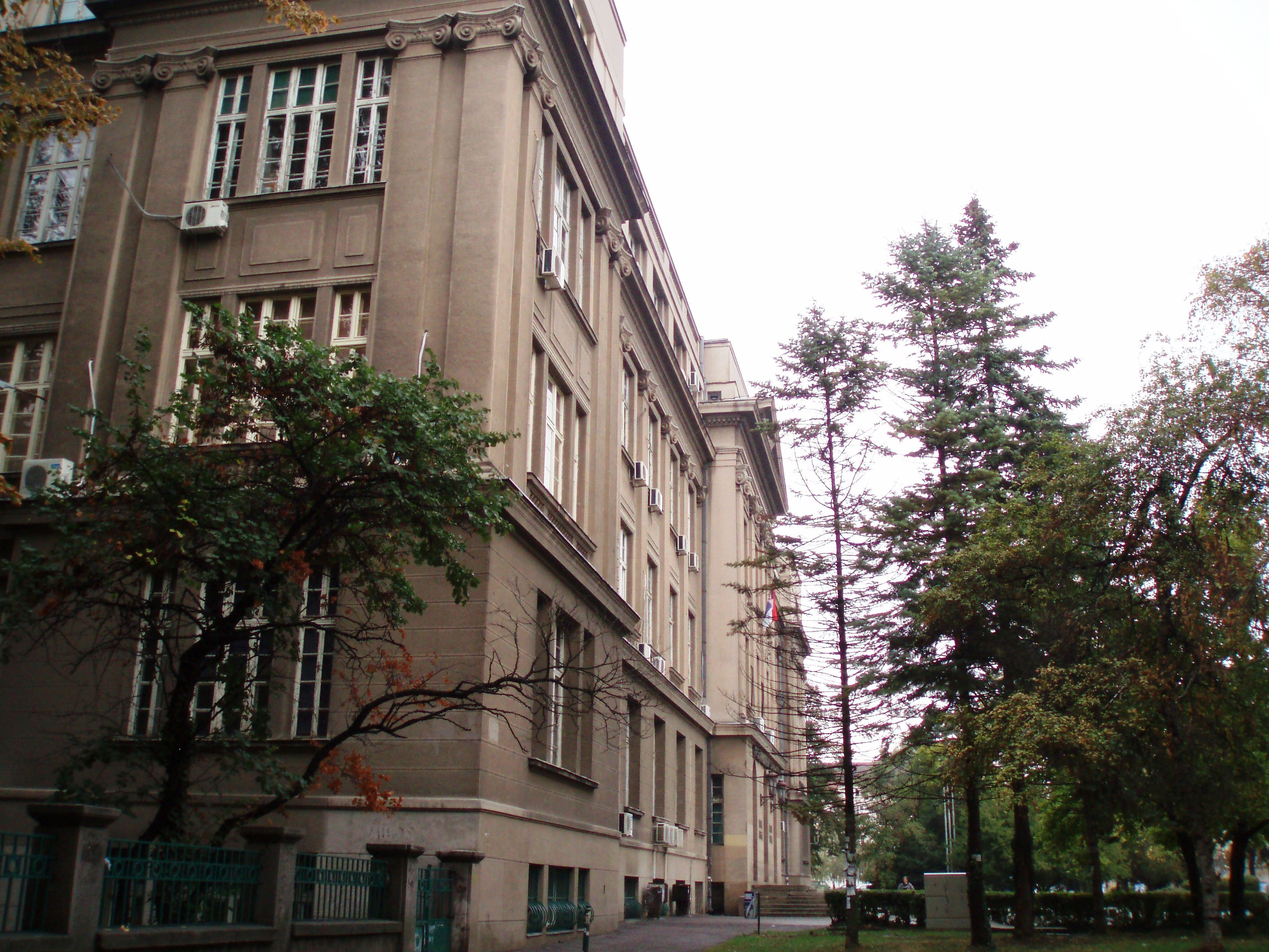 Fotografija zgrade Poljoprivrednosg fakulteta u Zemunu pogled sa ugla (Avijatičarski trg), Autor:Nicolo